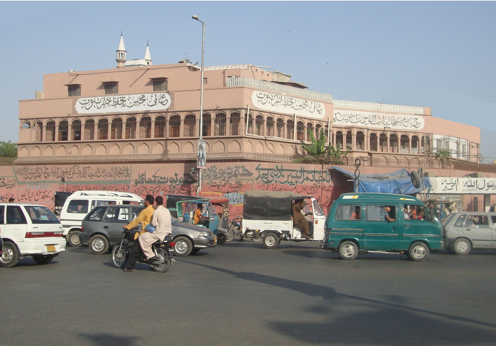 Masjid-e-Aalmi Majlis Tahaffuz-e-Khatm-e-Nabuwat